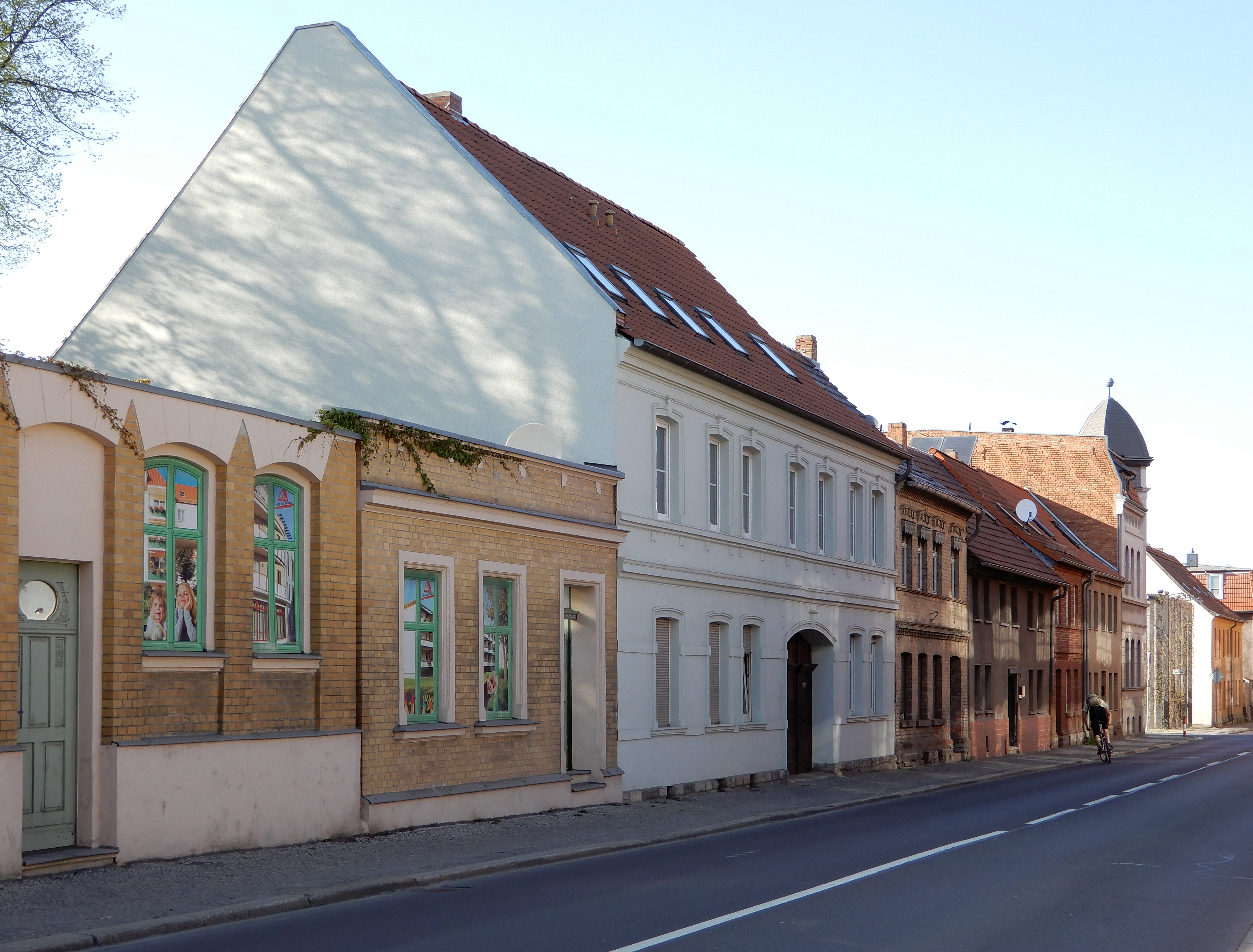 Gebäude Hinter dem Zoll 18-13 in Aschersleben